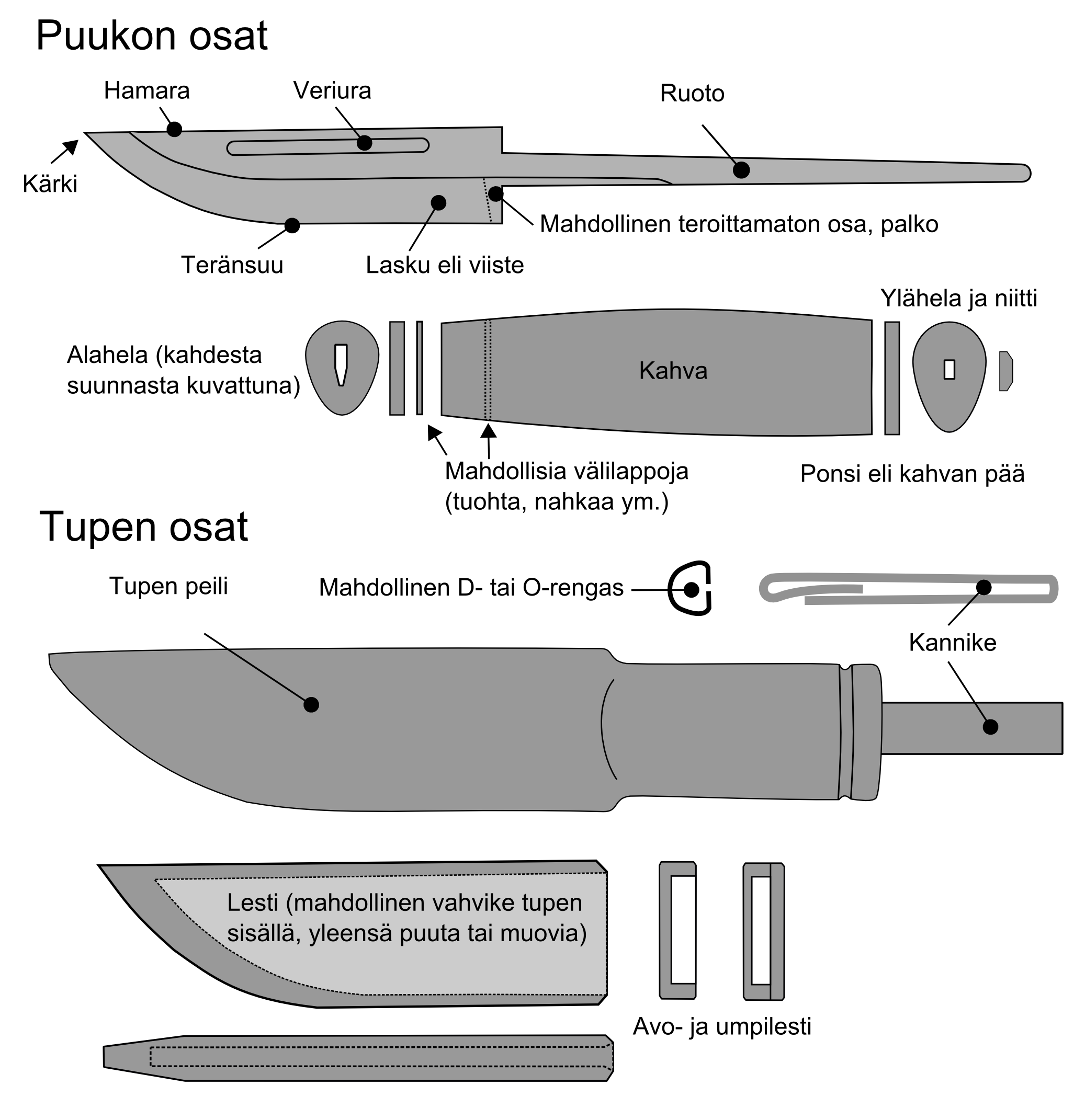 Puukon ja tupen osat nimityksineen